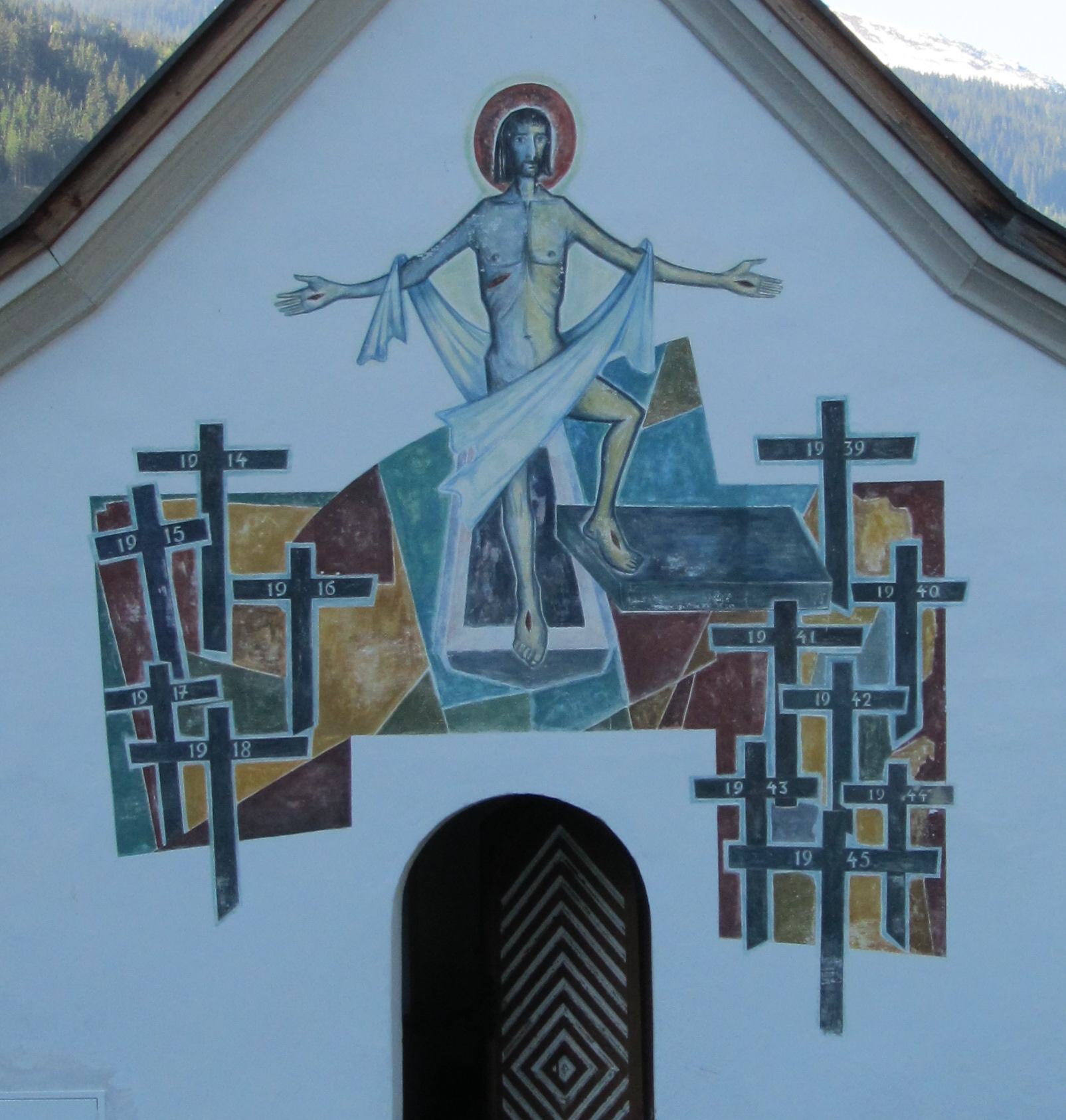 Friedhofskapelle See, seit 1964 auch Kriegerdenkmal This media shows the remarkable cultural object in the Austrian state of Tyrol listed by the Tyrolean Art Cadastre with the ID 30906. (on tirisMaps, pdf, more images on Commons, Wikidata)